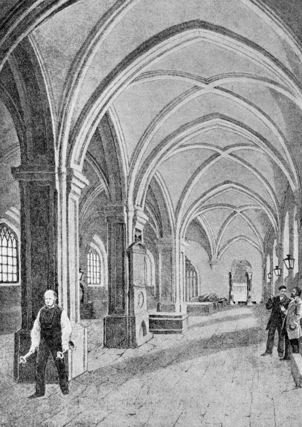 Helligåndskirken, Copenhagen, Denmark. Helligaandshuset, exhibition hall in 1894. From Illustreret Tidende.